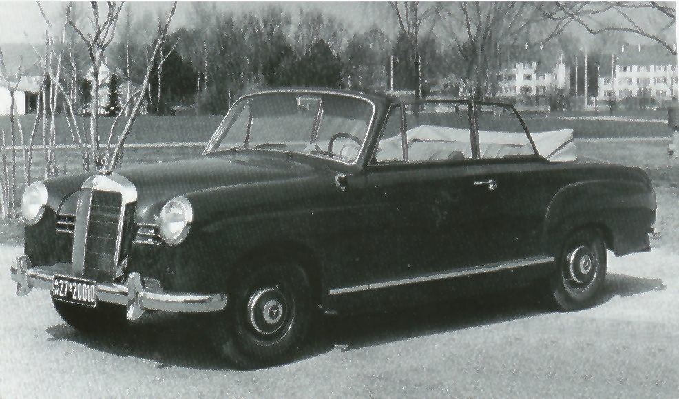 Prototyp Mercedes 180 Ponton Cabrio aus 1953